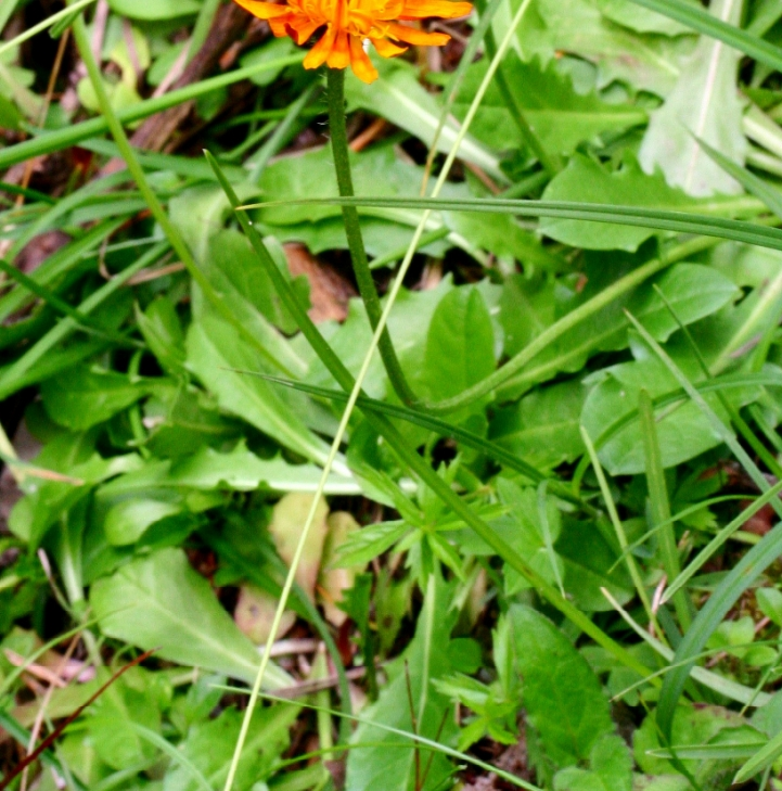 Crepis_aurea (Radichiella aranciata) Località : Cimabanche, Cortina (BL), 1529 m s.l.m.